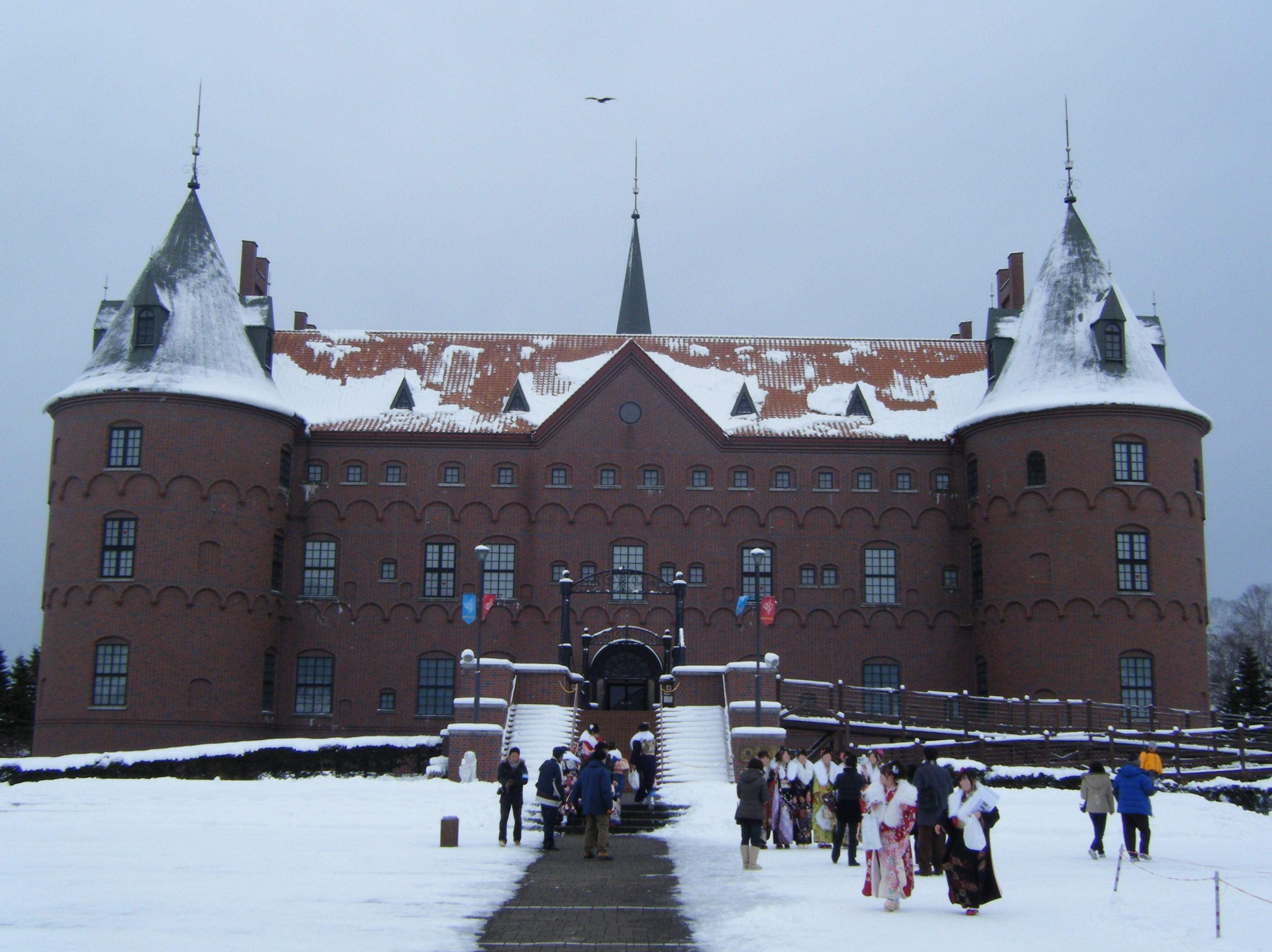 登別マリンパークニクス内にあるニクス城（モチーフはデンマークのイーエスコウ城）